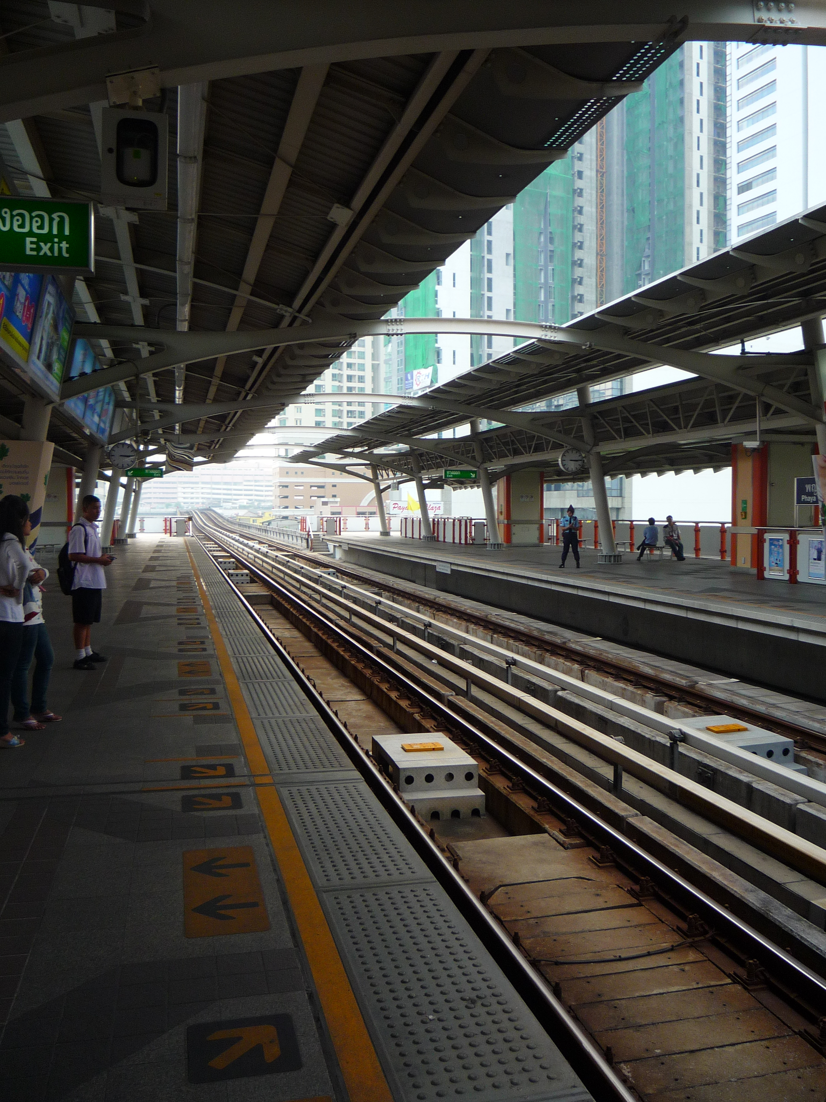 สถานีรถไฟฟ้า BTS สถานี พญาไท